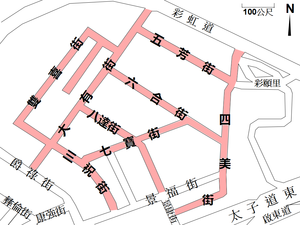 中文（香港）: 香港新蒲崗八街地圖